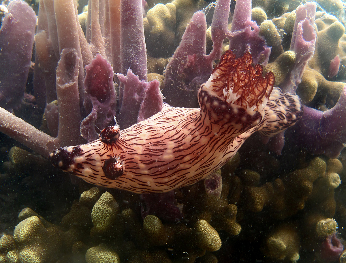 La limace de mer "Jorunna veineuse" (Jorunna rubescens) à la Réunion.